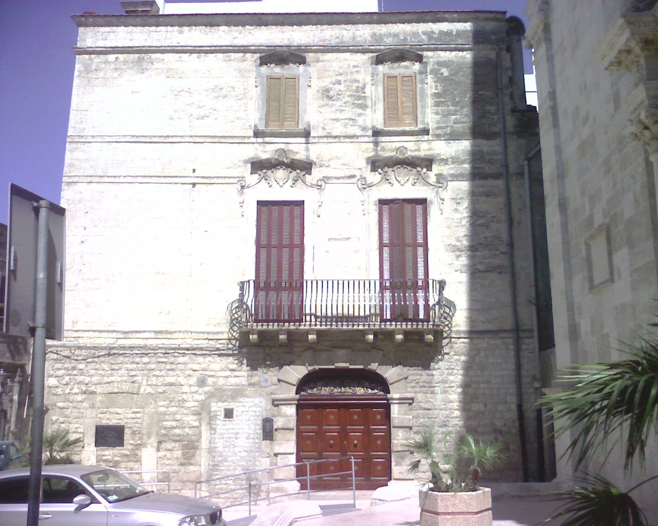 palazzo maranta- Modugno (bari)-Italy